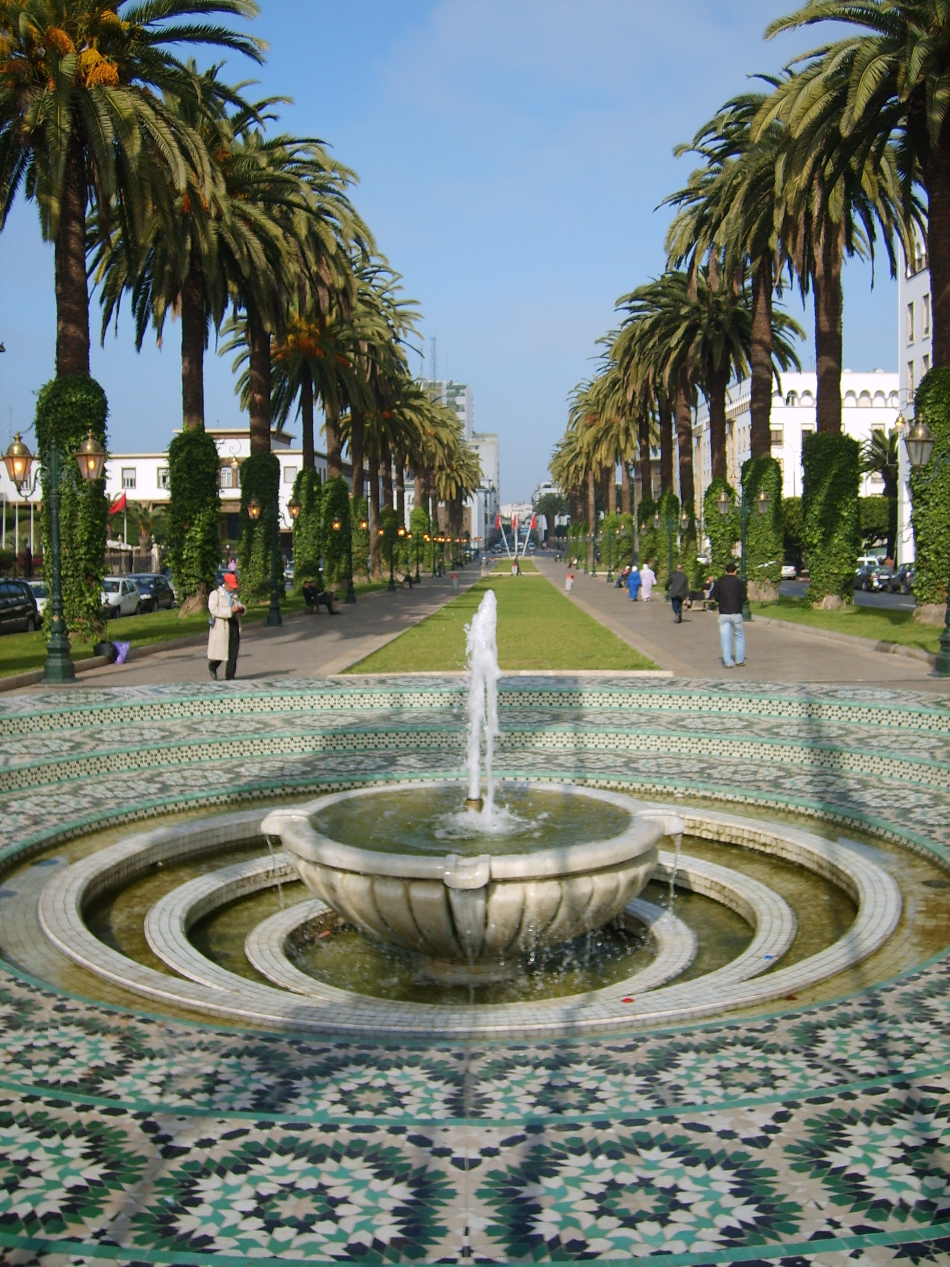 Avenue Mohammed V à Rabat, Maroc